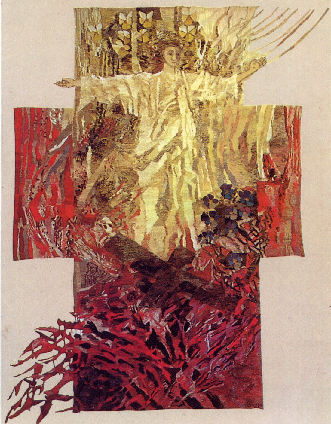 Bilde av altertavlen i Søndre Slagen kirke